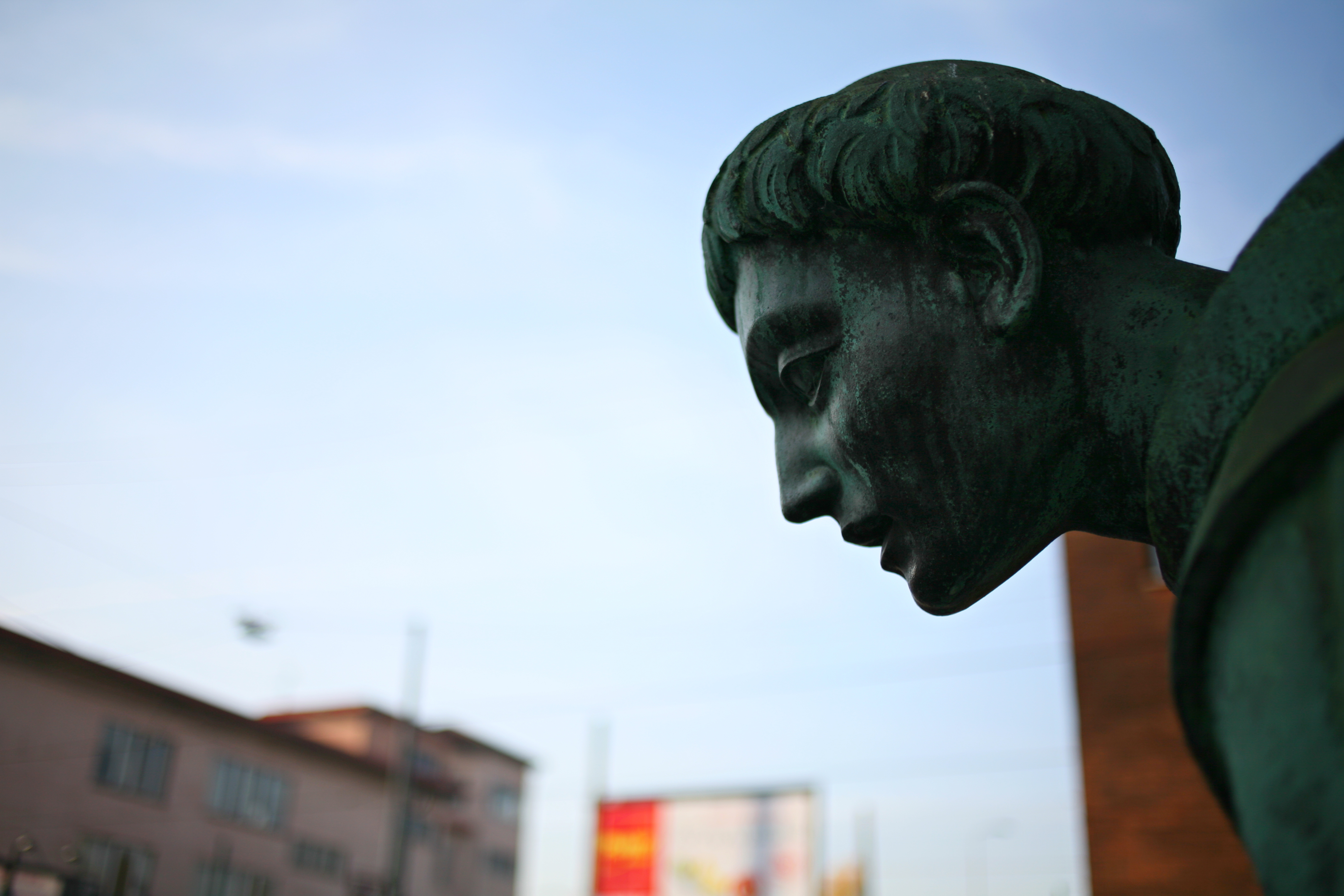 Giuseppe Maretto firma sul santuario di Sant'Antonio da Padova 1932-X (Milano)